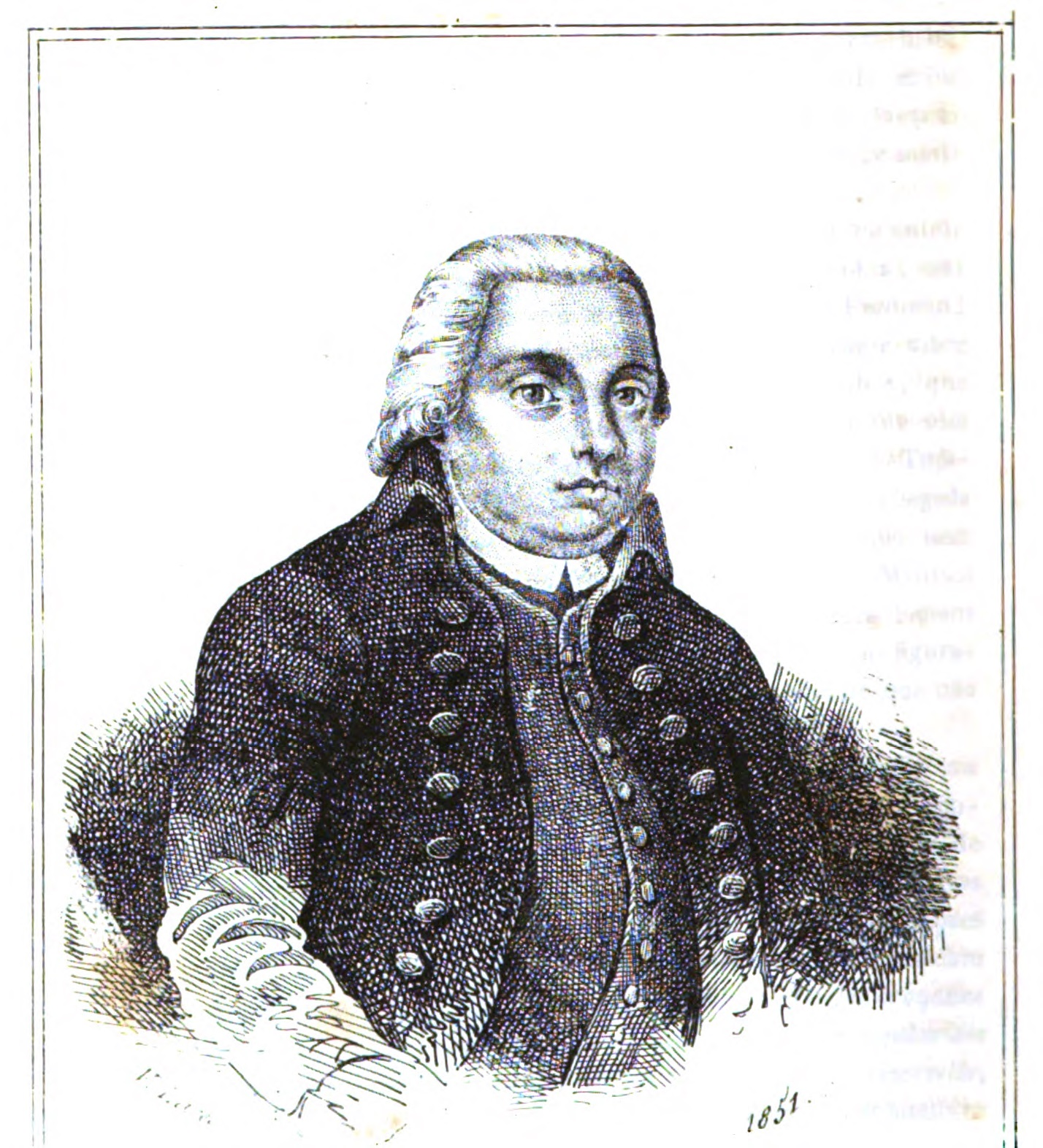 Domingos Caldas Barbosa (Lereno Selinuntino).